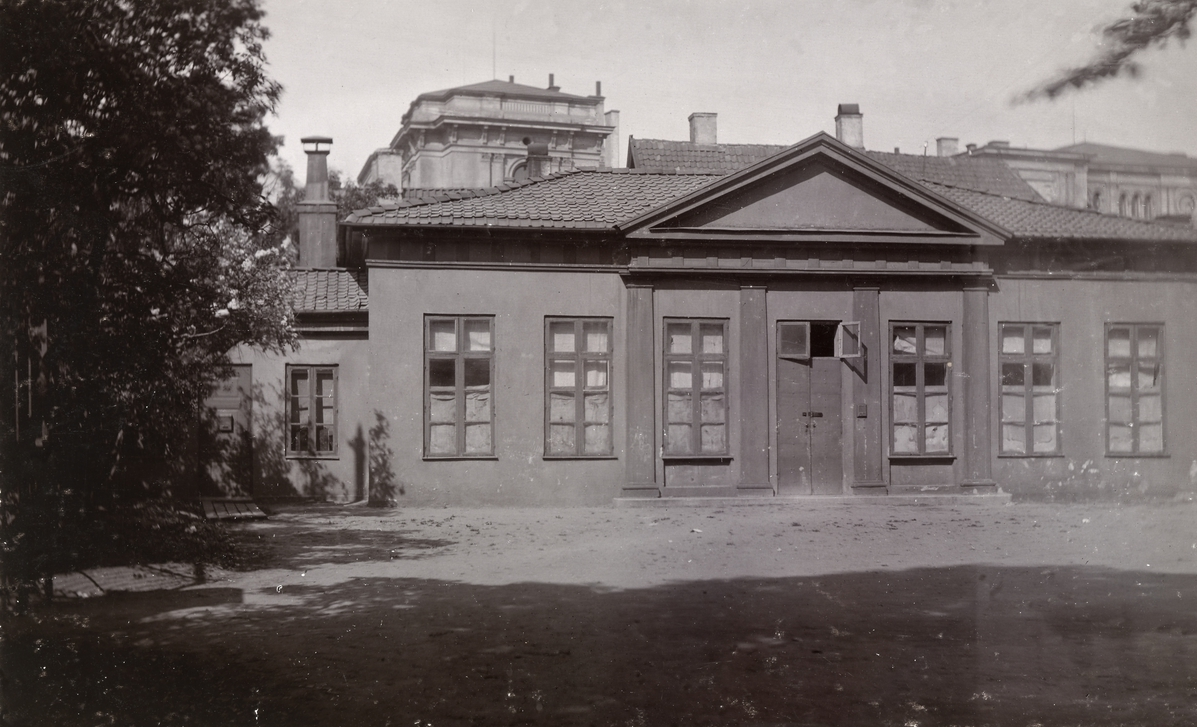 Paviljong i Paléhaven, revet 1897